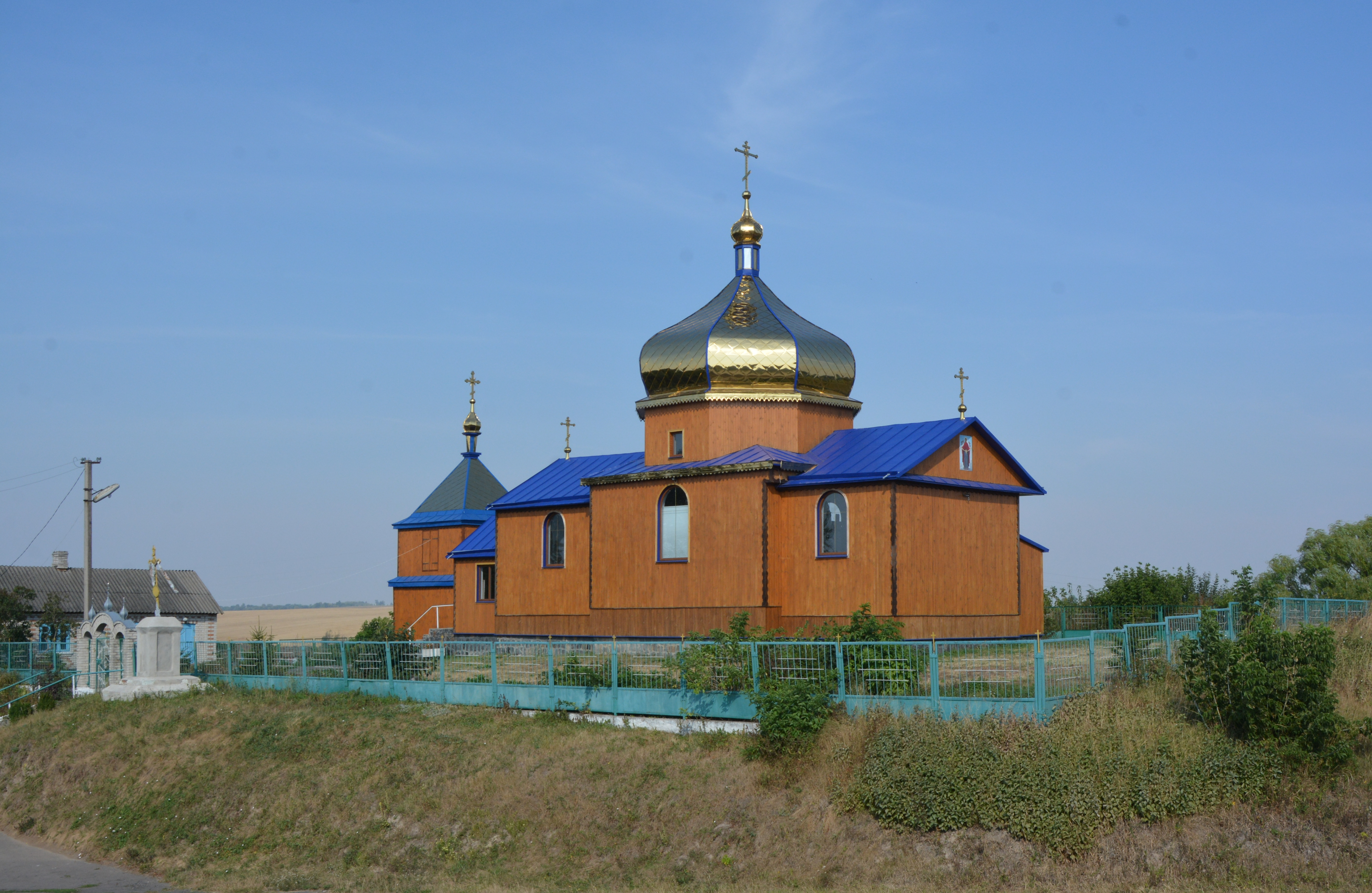 Ансамбль Борисоглібської церкви, Шклинь